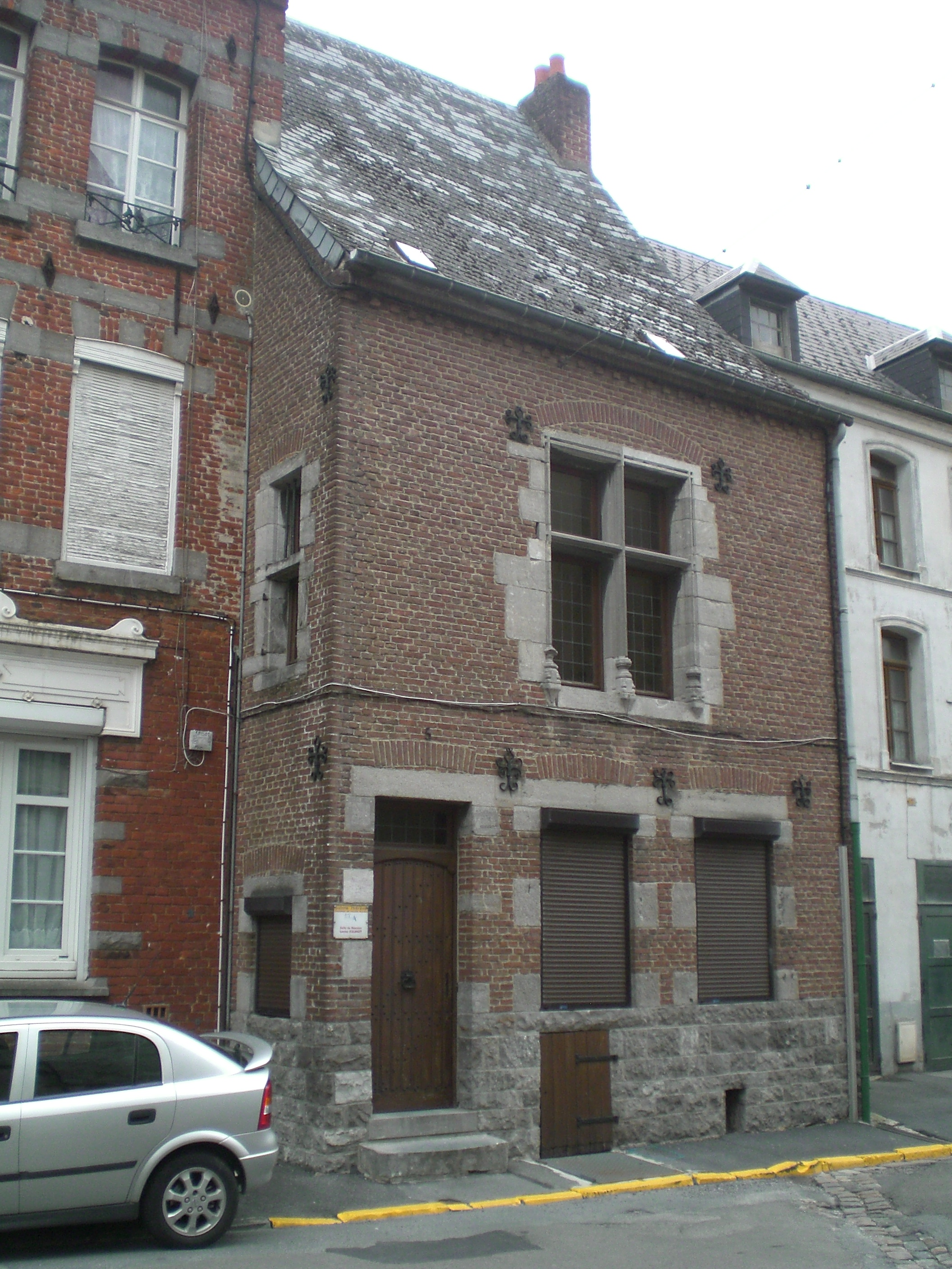 maison ancienne d'avesnes sur help nord france